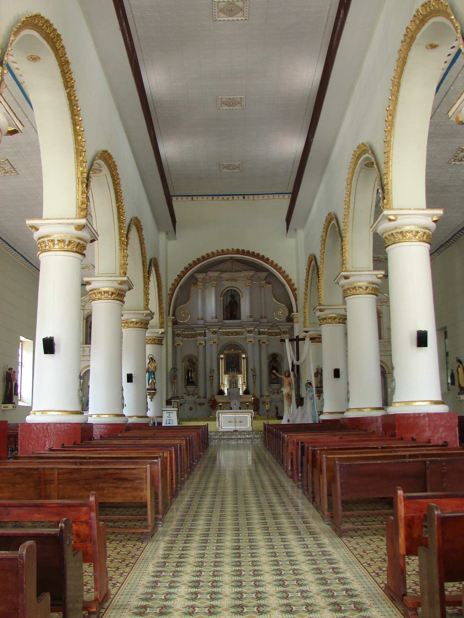 Iglesia de Nuestra Señora de la Asunción del Municipio de Sopetrán. Antioquia, Colombia, obra arquitectónica de estilo romano toscano, posee tres naves, altar central, una torre de 28 m. y la imagen de la Virgen Morena de Sopetrán, patrona del municipio, entre otras como la de Nuestra Señora del Carmen, Santa Ana, el Corazón de Jesús y La Inmaculada.